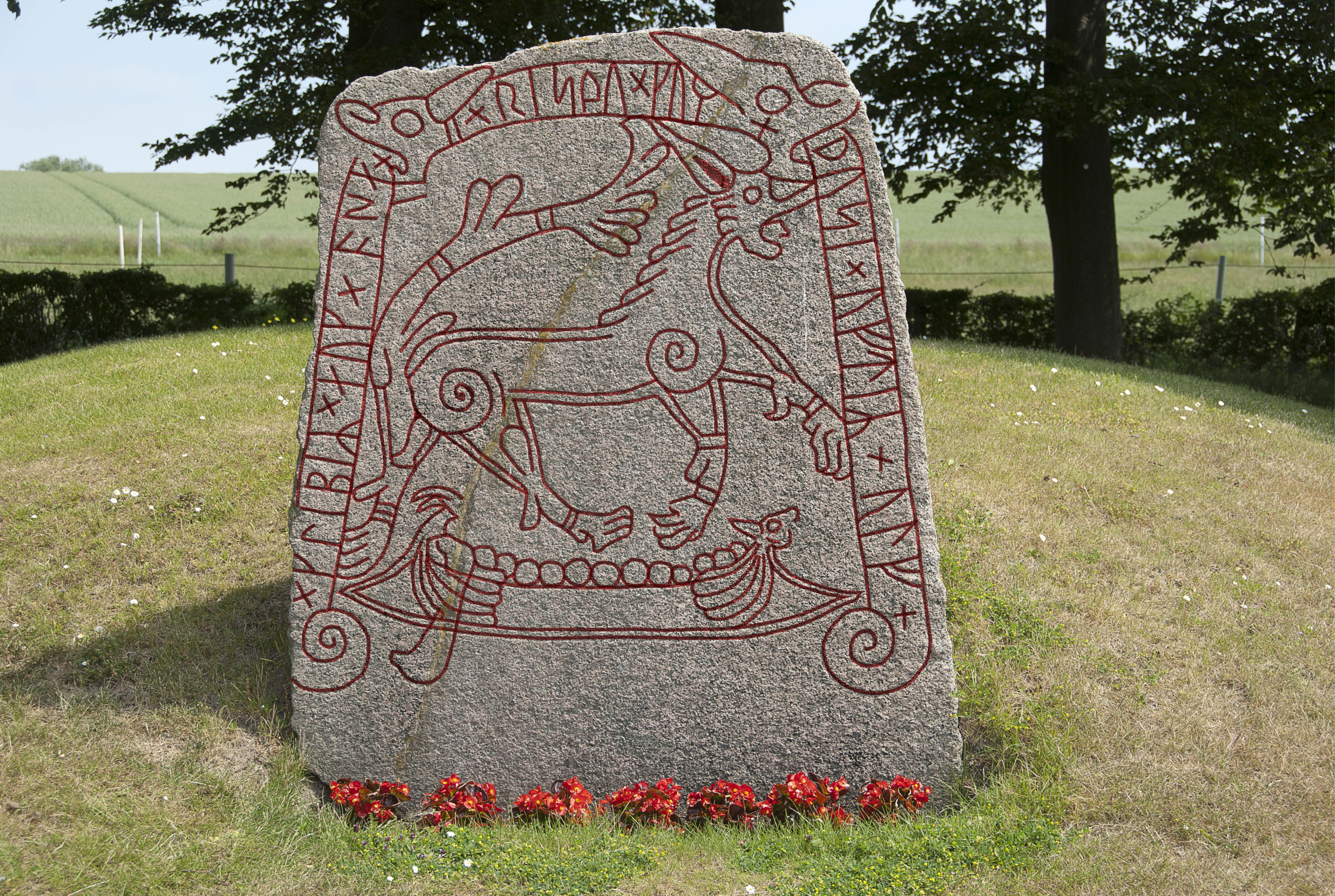 Tullstorp runsten från 980-talet.